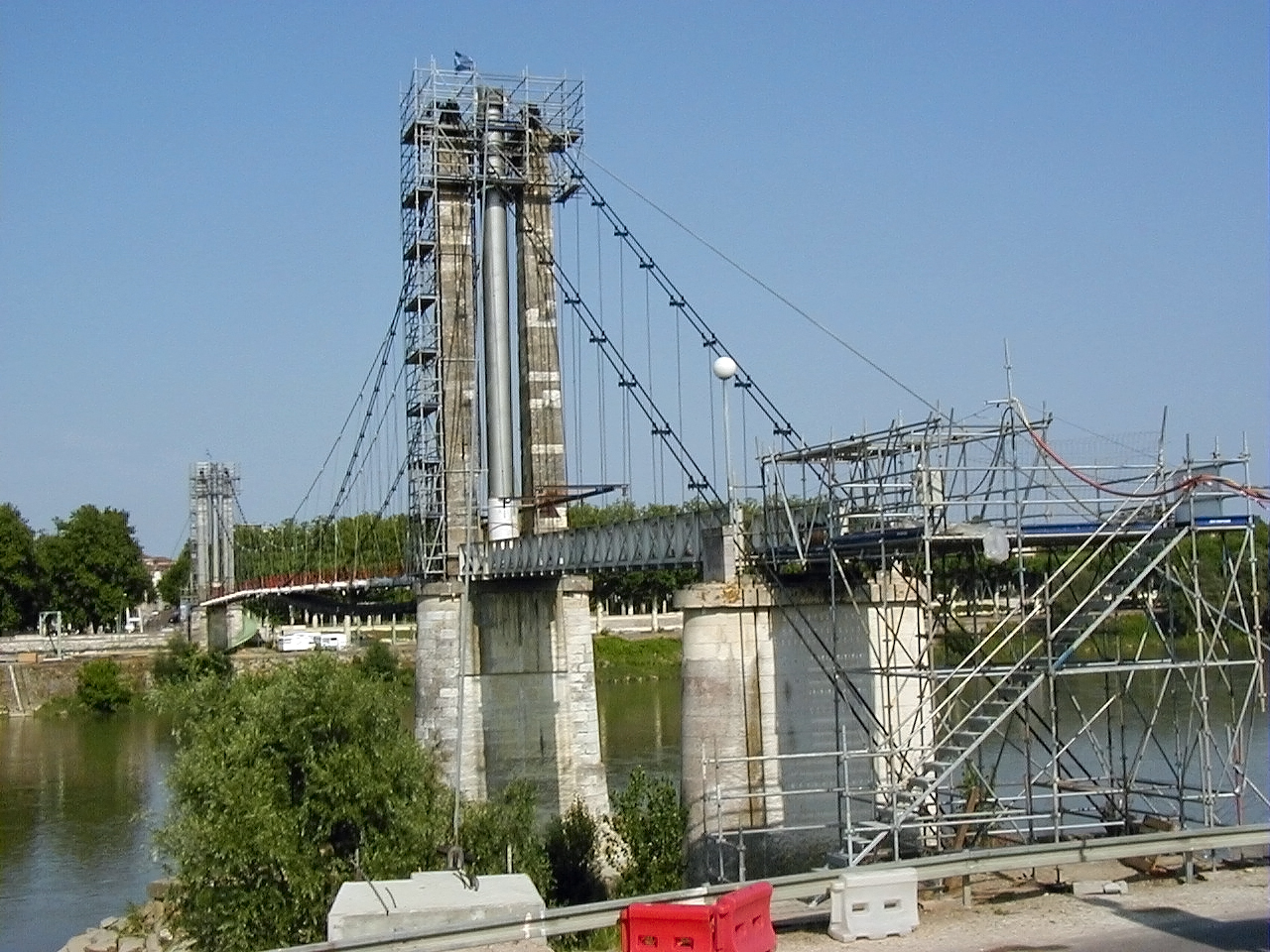 Agen - Passerelle - Rénovation en 2005